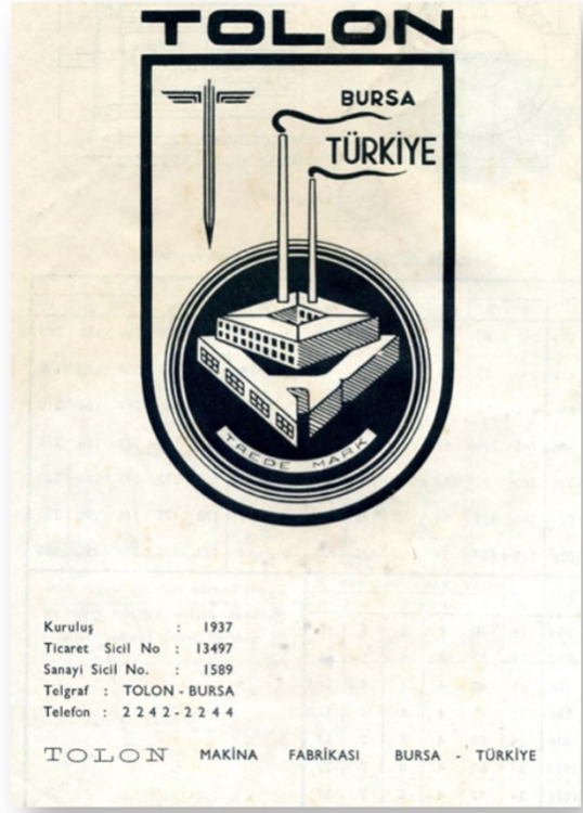 Tolon Makina Broşürü